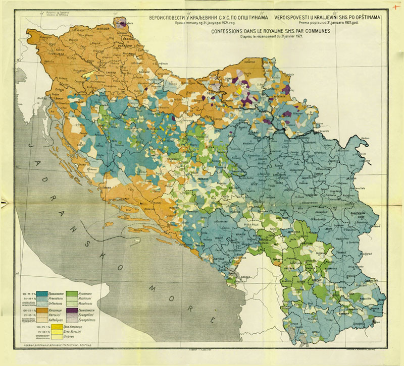 Вјерска мапа Краљевине Југославије 1921. године.png